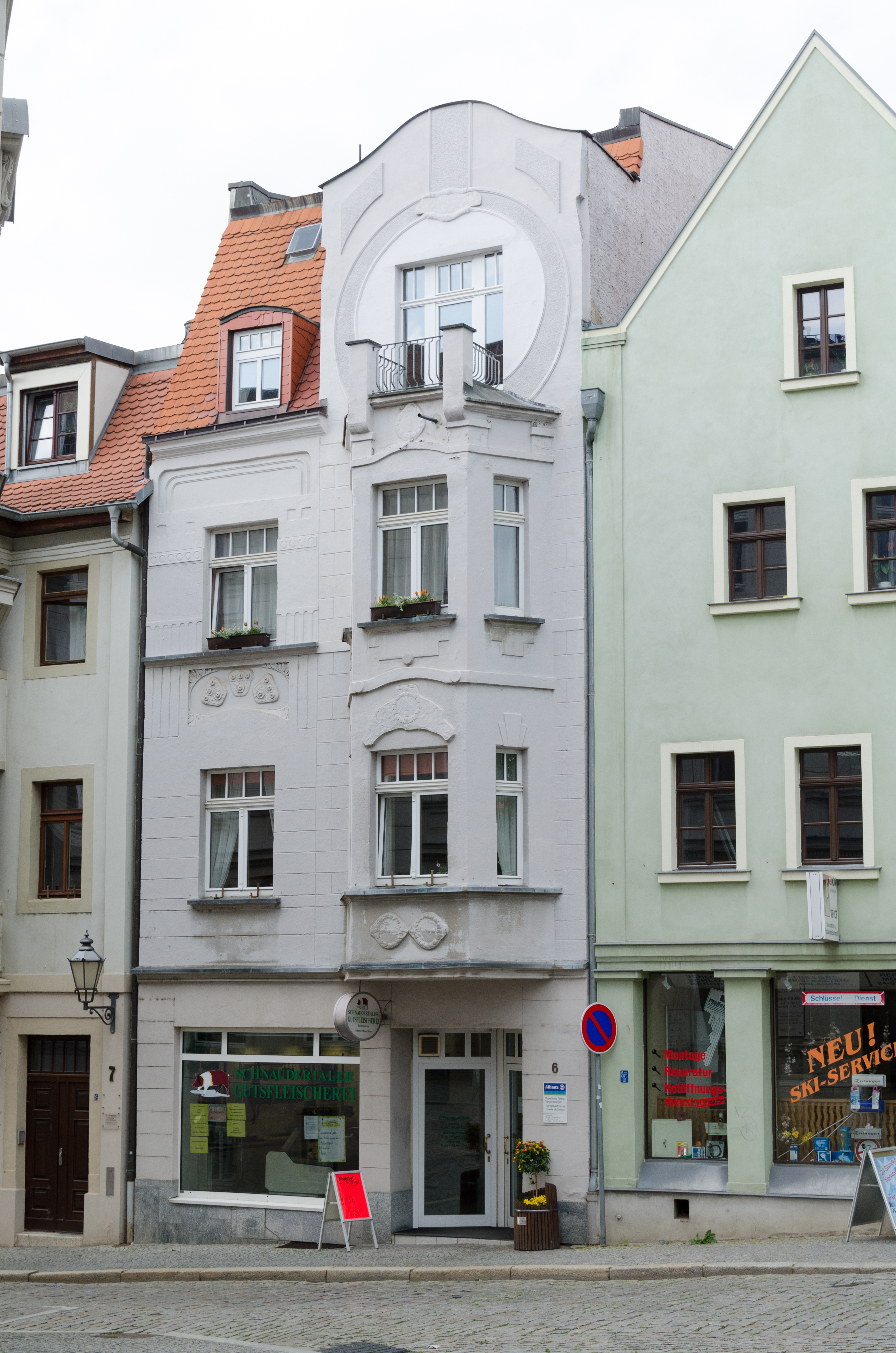 Zeitz, Brüderstraße 6